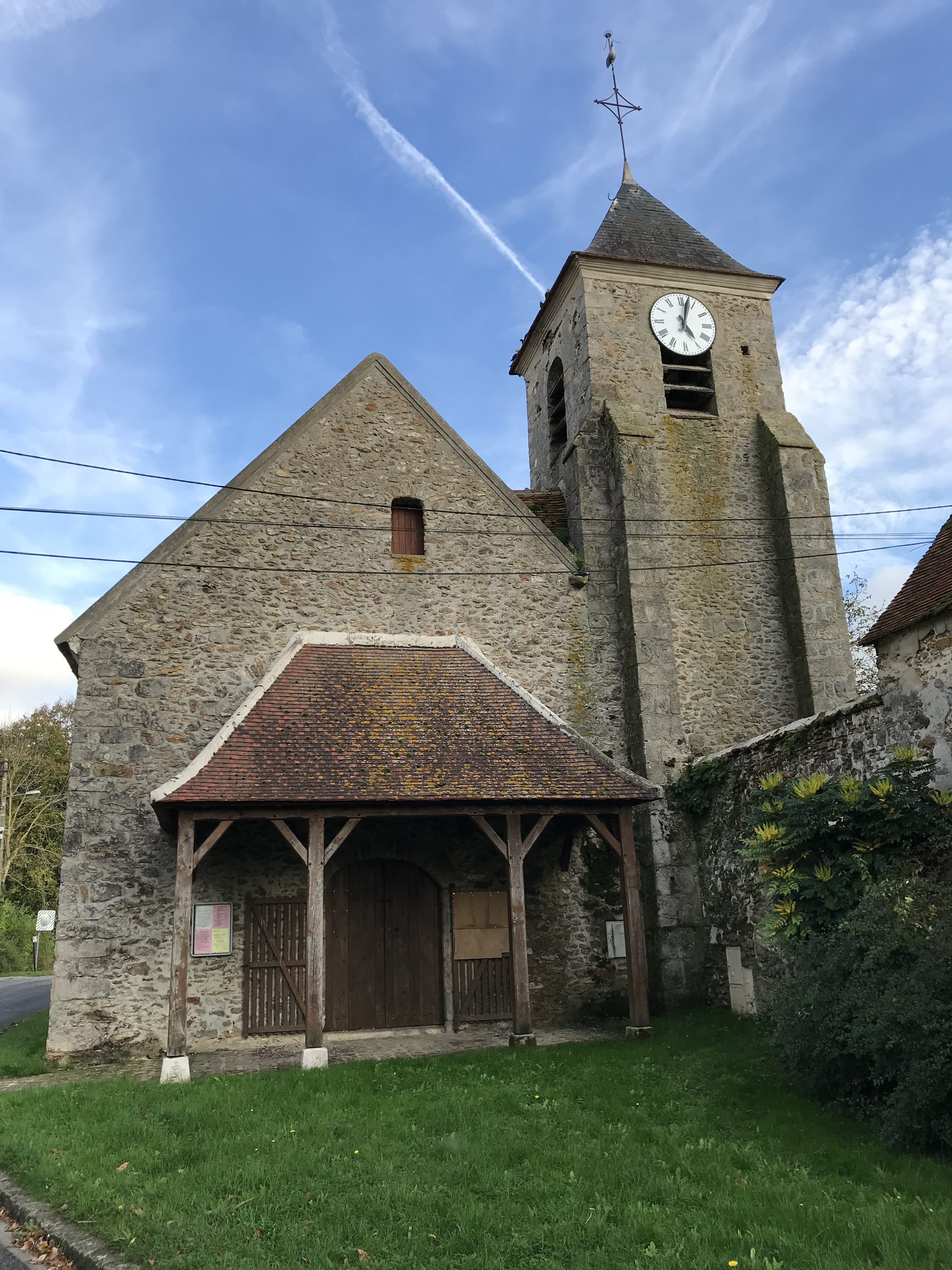 Église Saint-Nicolas du Plessis-Feu-Aussoux (Seine-et-Marne, France) en octobre 2017.